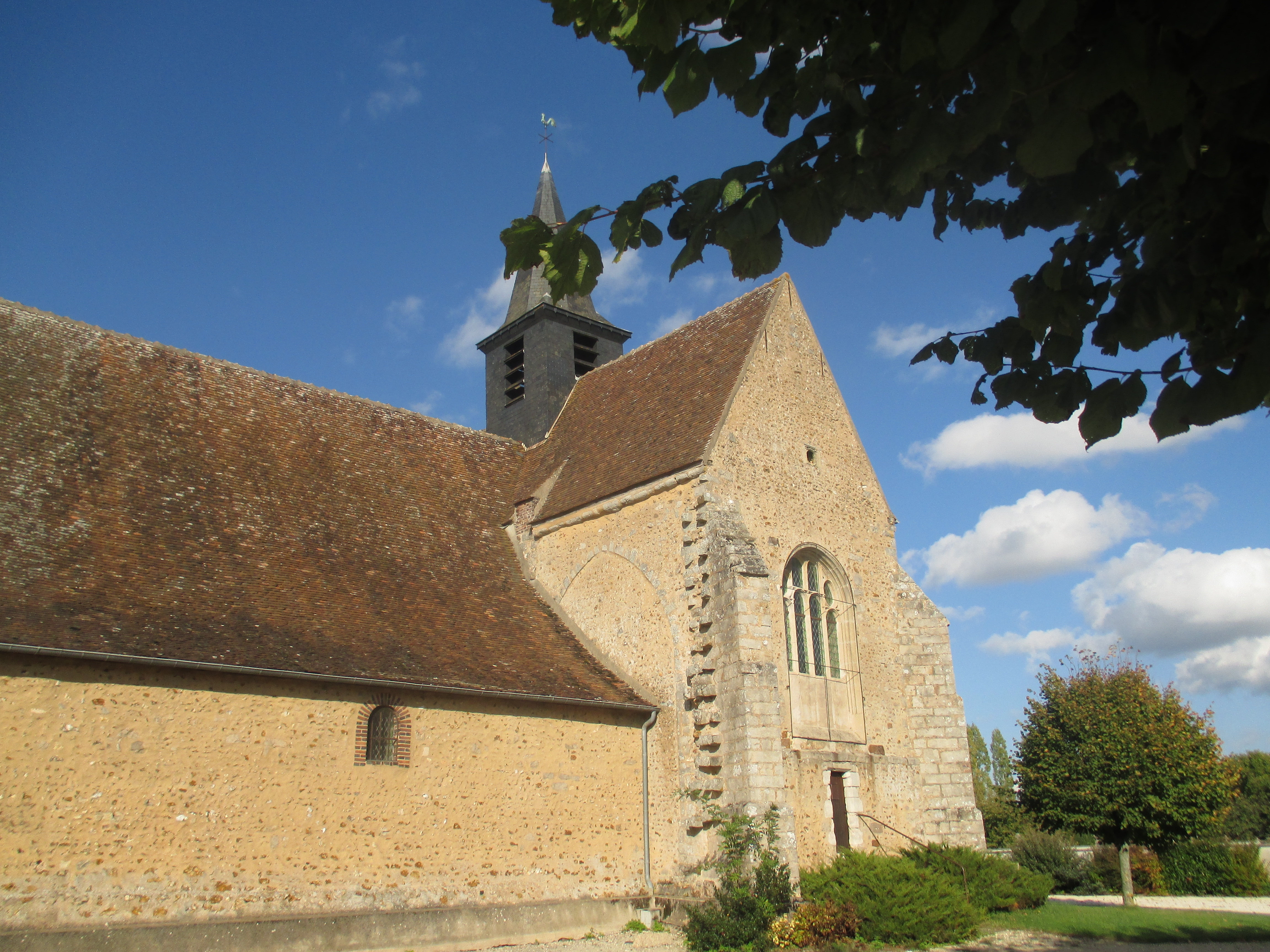 Église Saint-Pierre de Bussy-le-Repos (Yonne)